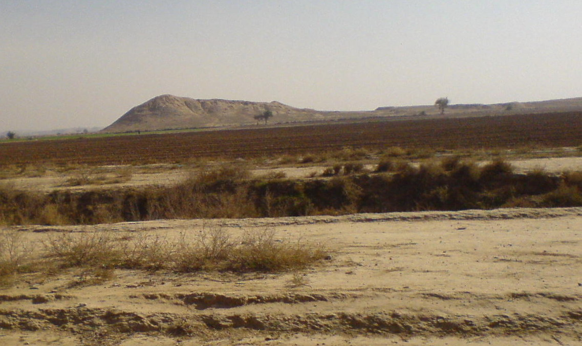 تپه باستانی چغامیش